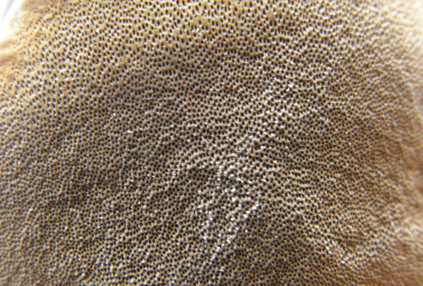 Szilvatapló